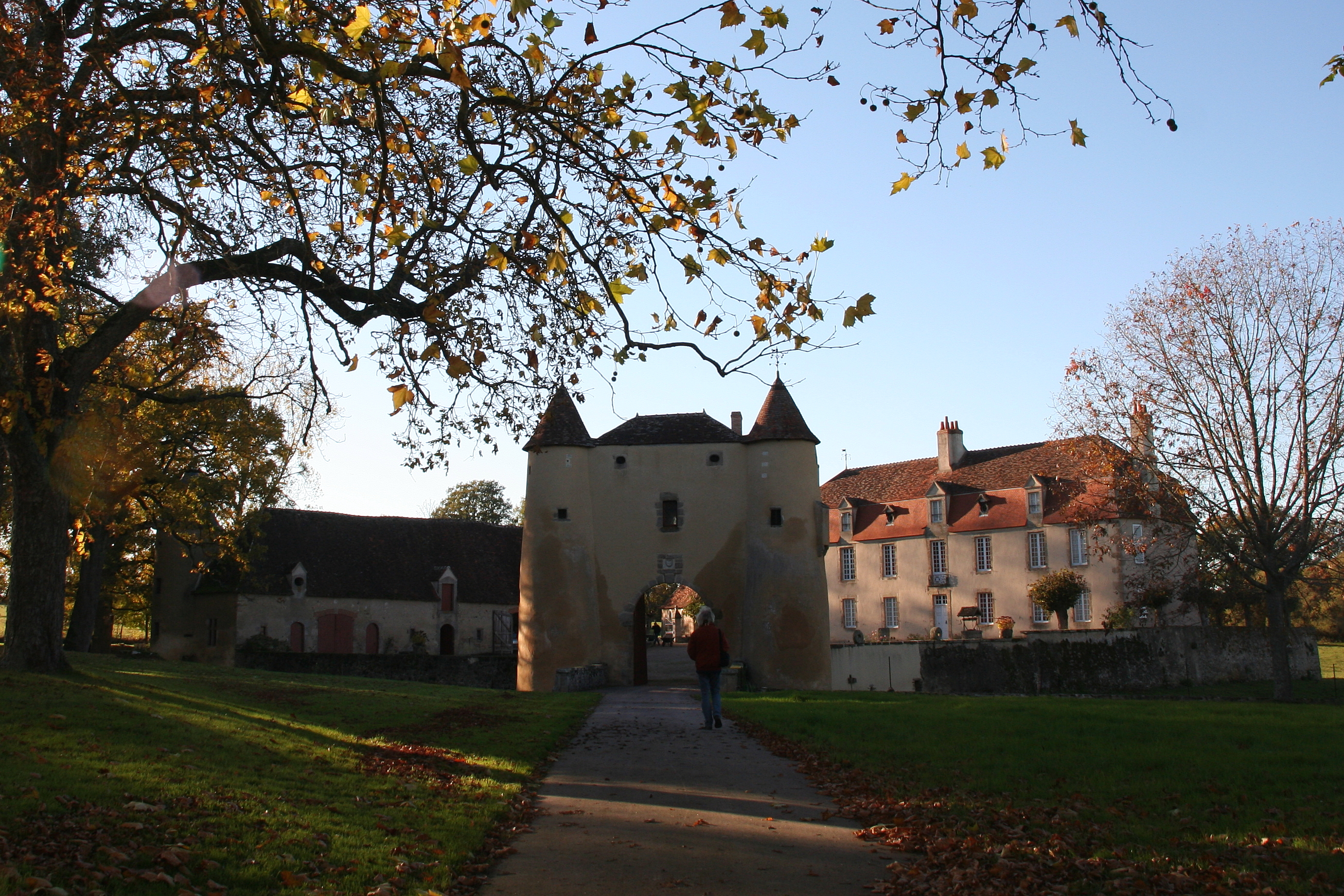 Château de Breuil-Yvain (Inscrit) .